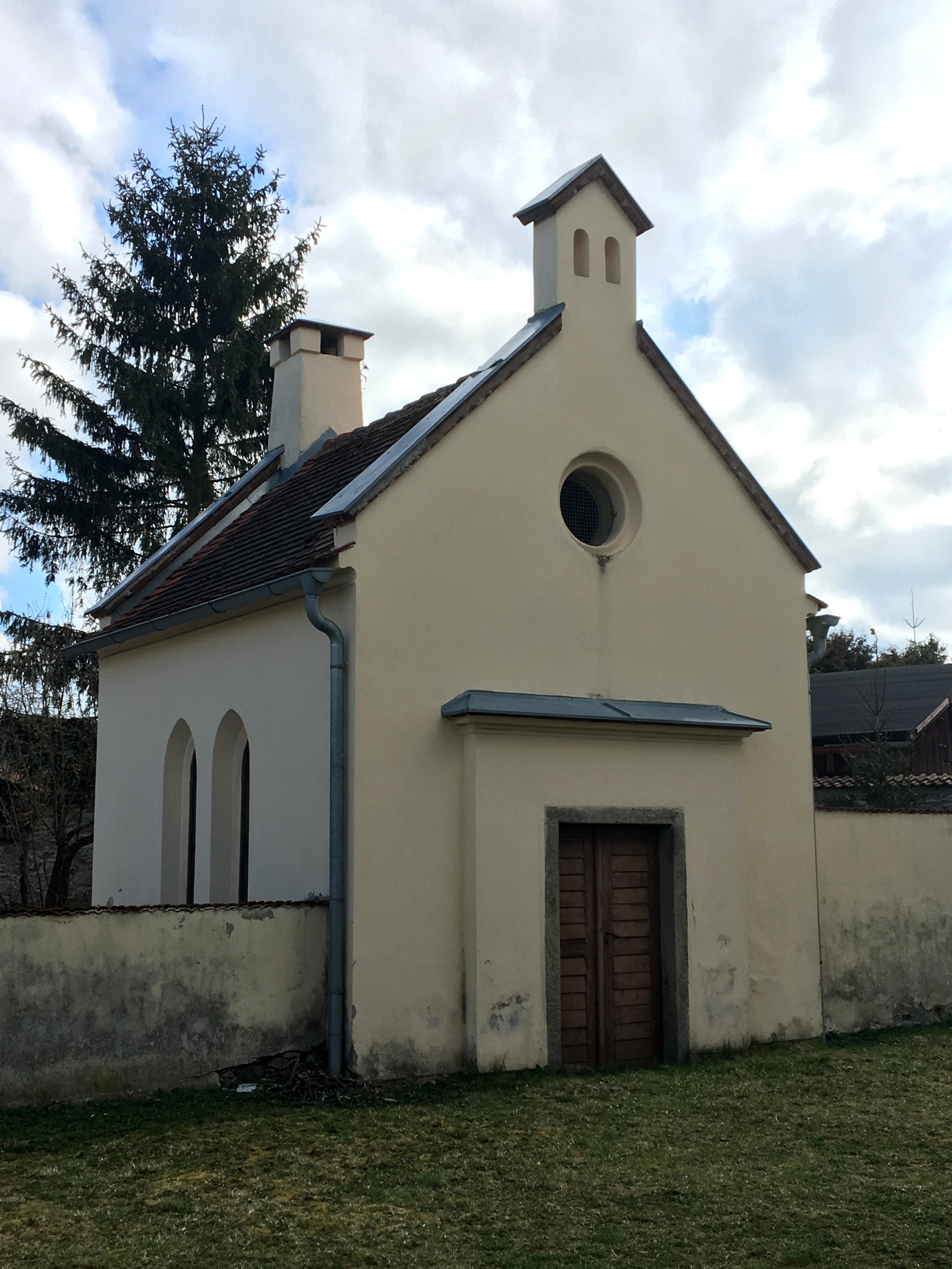 Kostel sv. Vavřince, márnice